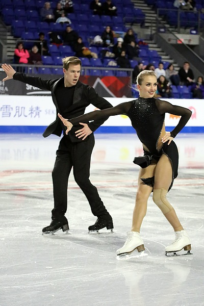 Виктория Синицина и Никита Кацалапов в Финале Гран-при 2018/2019